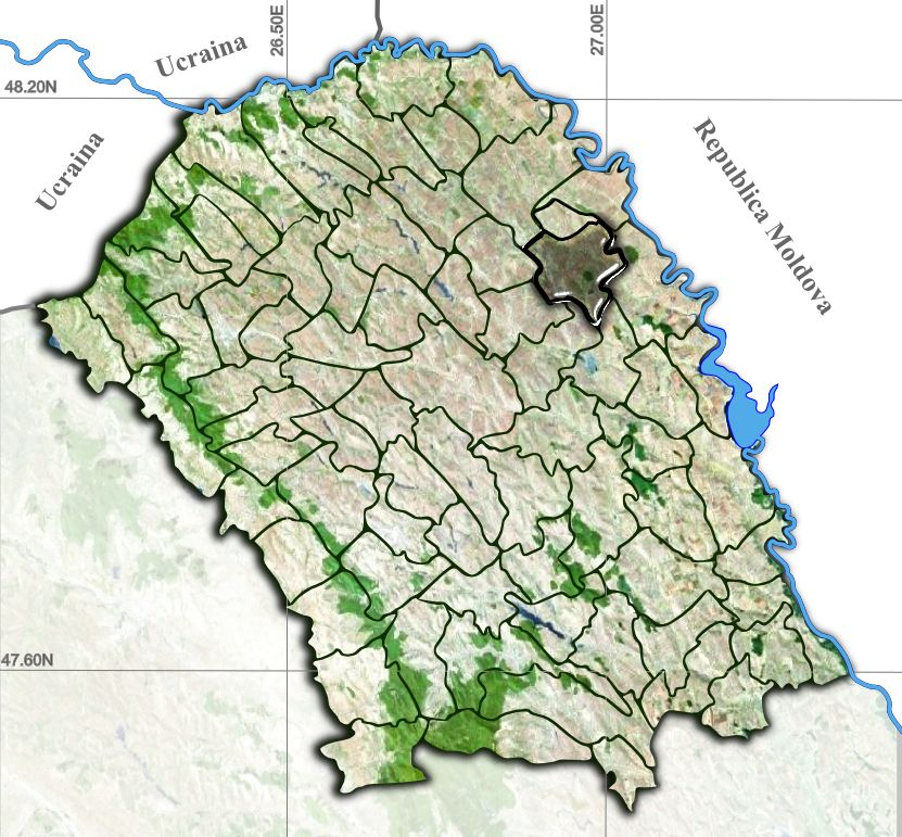 Avrameni jud Botosani.